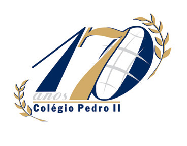 Logomarca comemorativa dos 170 anos do Colégio Pedro II